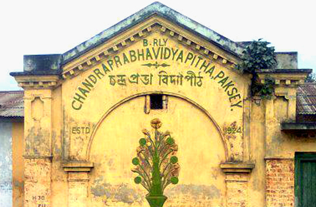 M. Ahsanul Haq M. Ahsanul Haq